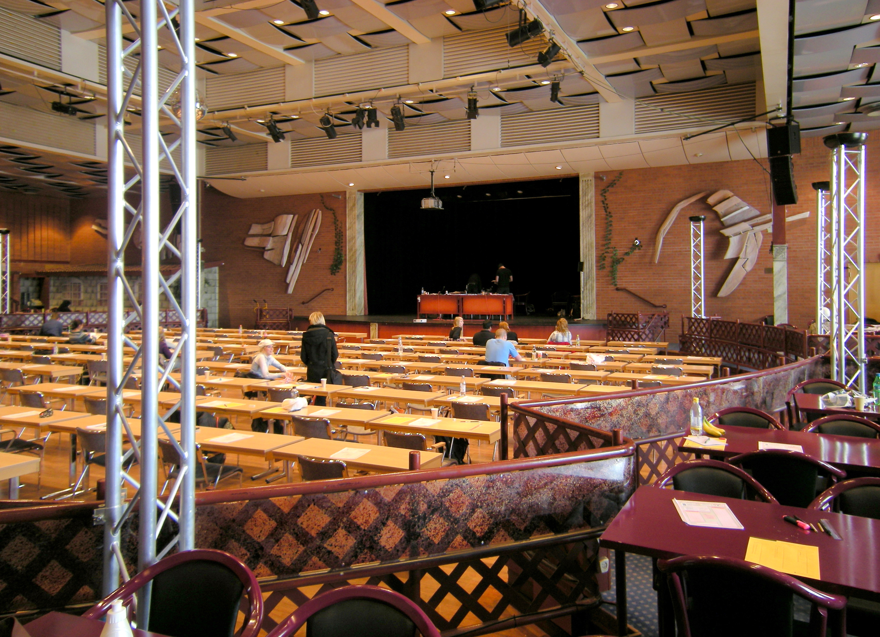 Borlänge Folkets hus, Stora Björn.